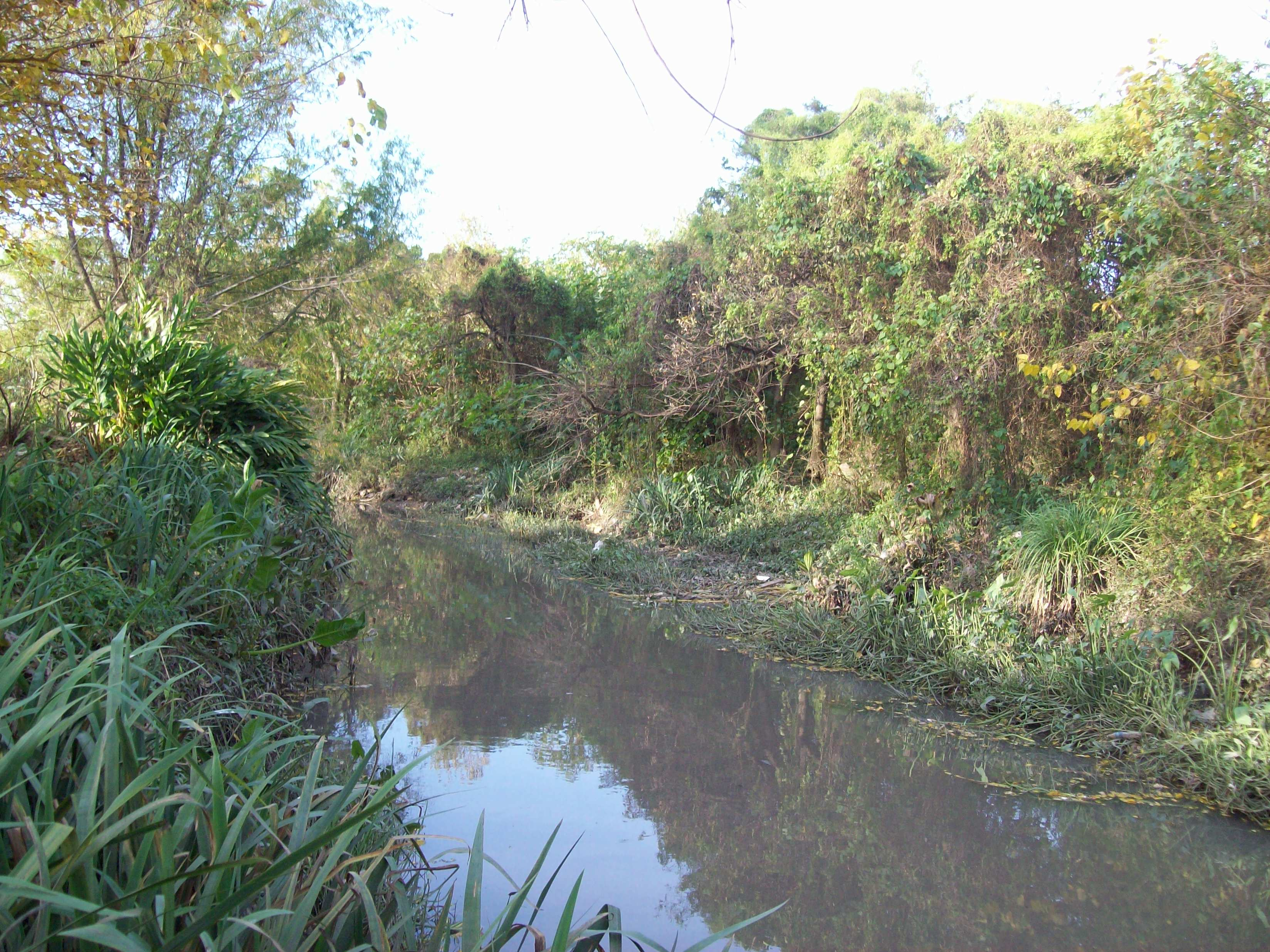 El arroyo Raggio, frontera entre la Ciudad Autónoma de Buenos Aires y la provincia de Buenos Aires, en el centro-este de la Argentina.